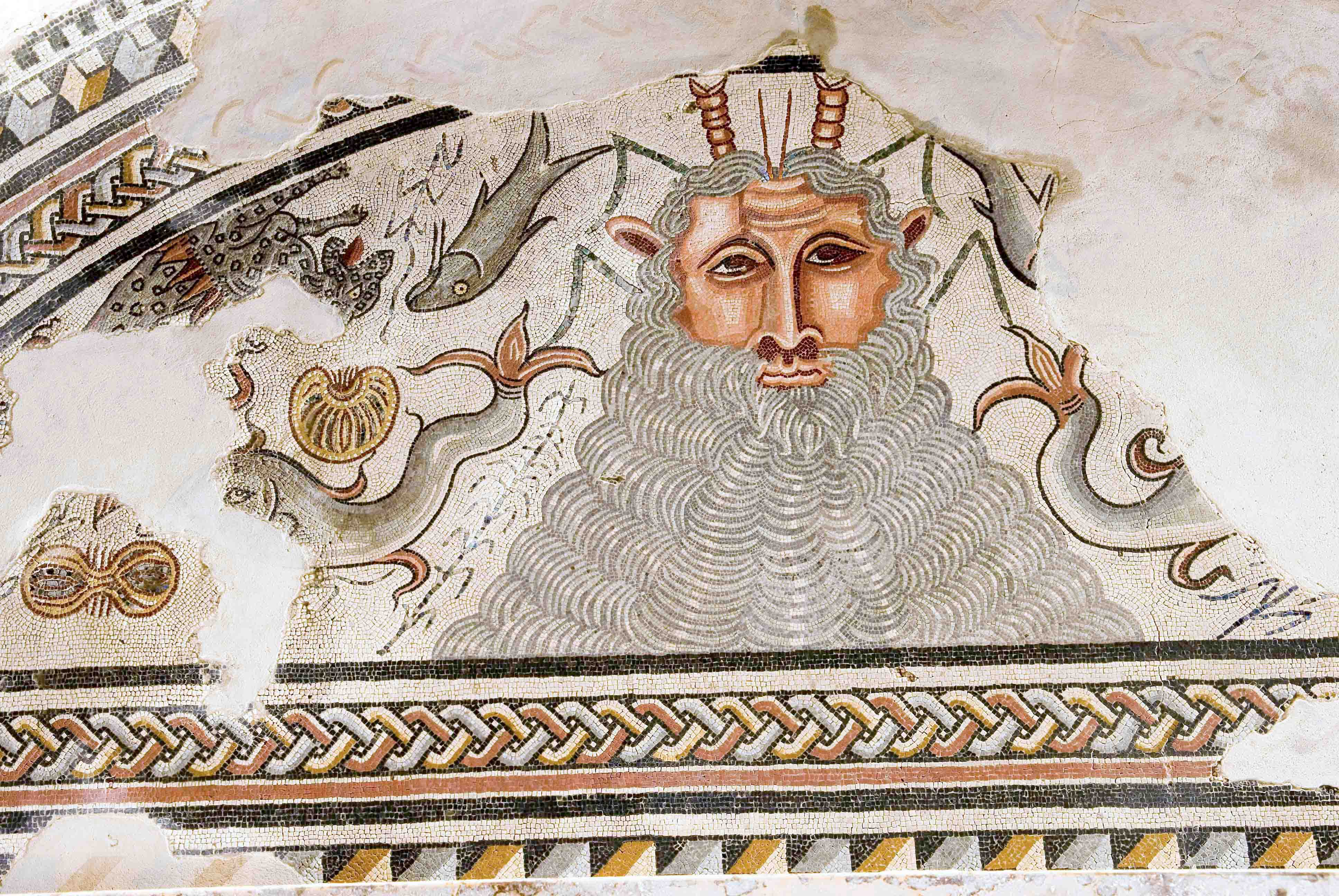 Detalle del mosaico del Dos Océano, Villa Romana de Carranque